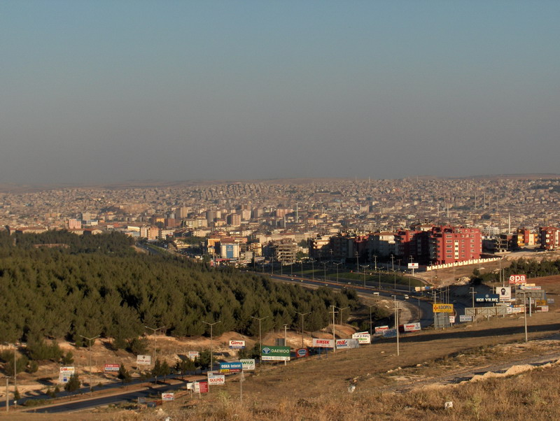 Foto is opgenomen tijdens vakantie in 2003